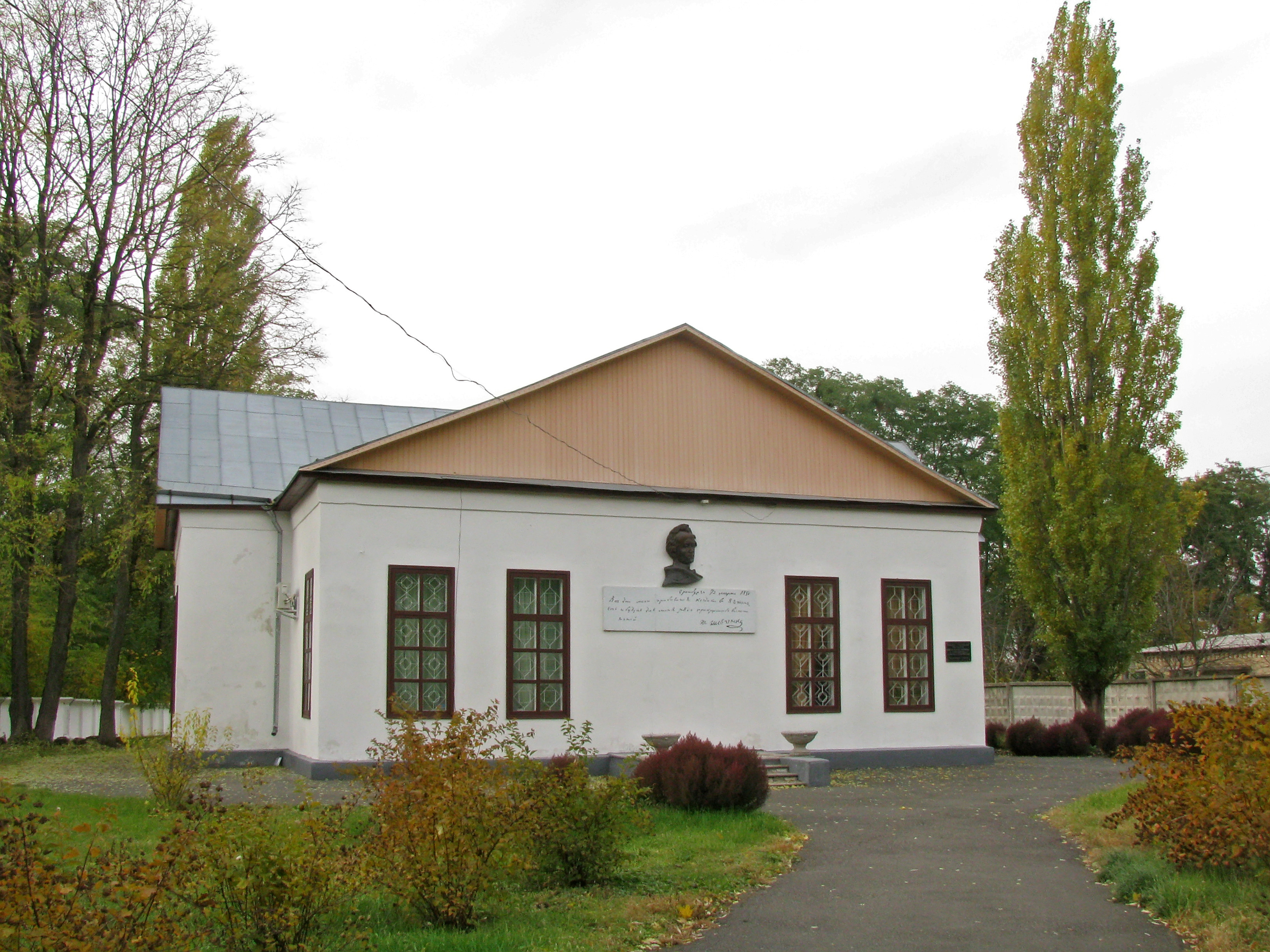 Флігель садиби Репніних (мур.), Яготин